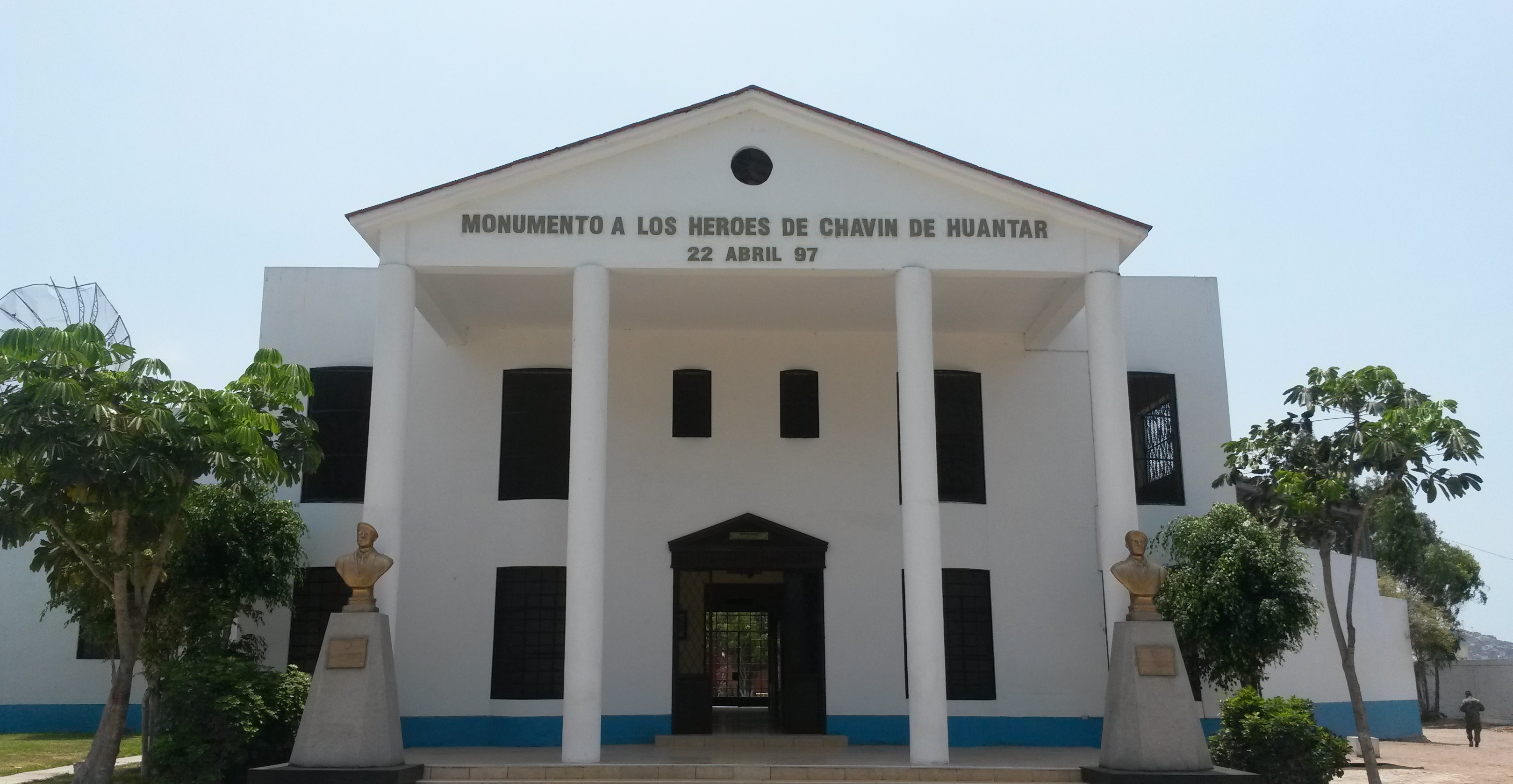 Réplica de la residencia del embajador de Japón en Lima, convertida en Monumento a los Héroes de Chavín de Huantar.